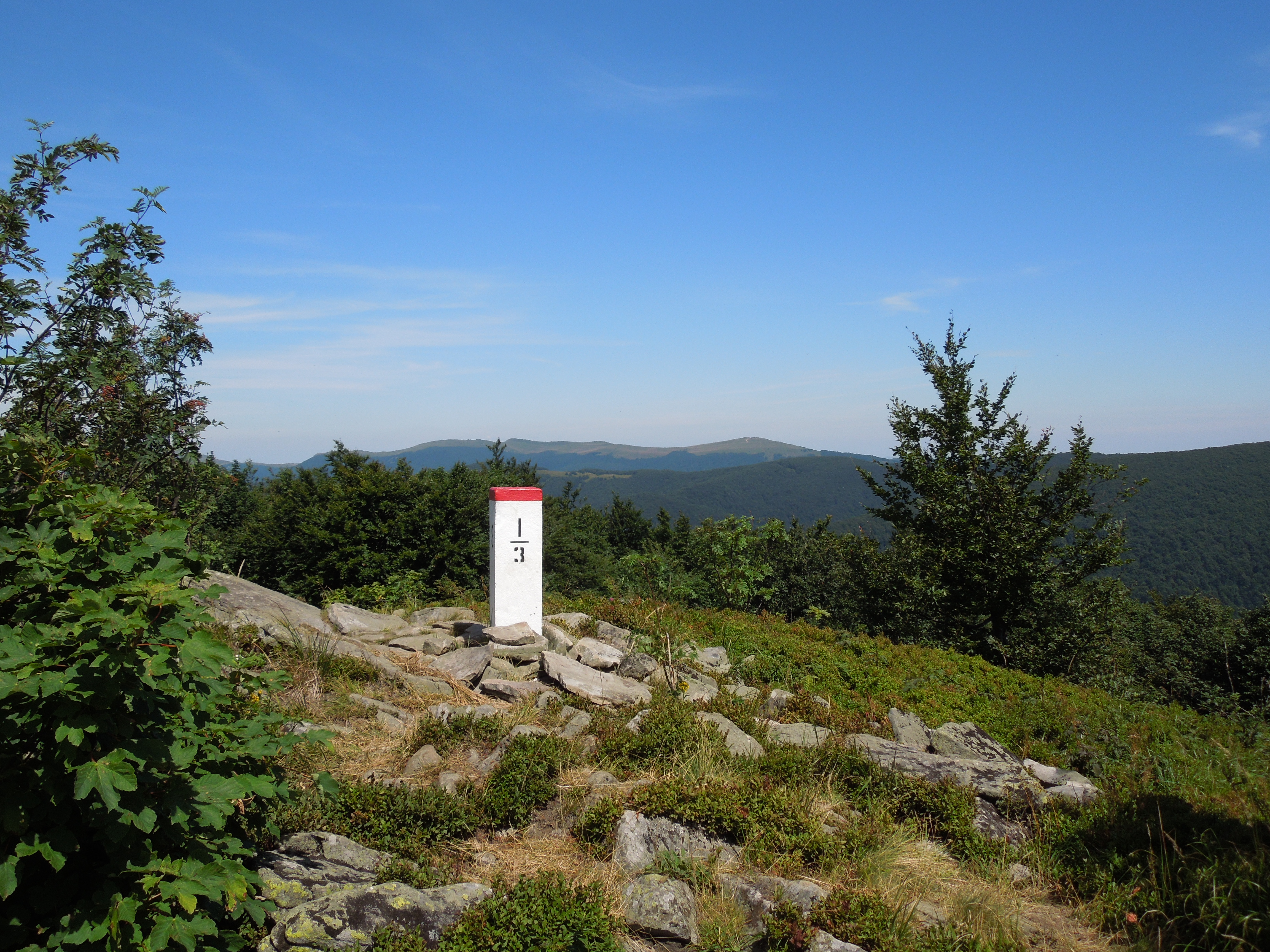 Vrchol Kamennej lúky začiatkom augusta